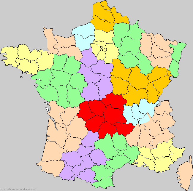 France - Proposition de découpage régional Gravier - 1958 - Source : J.M. Miossec, Géohistoire de la régionalisation en France : L’horizon régional, Quadrige/PUF, 2008